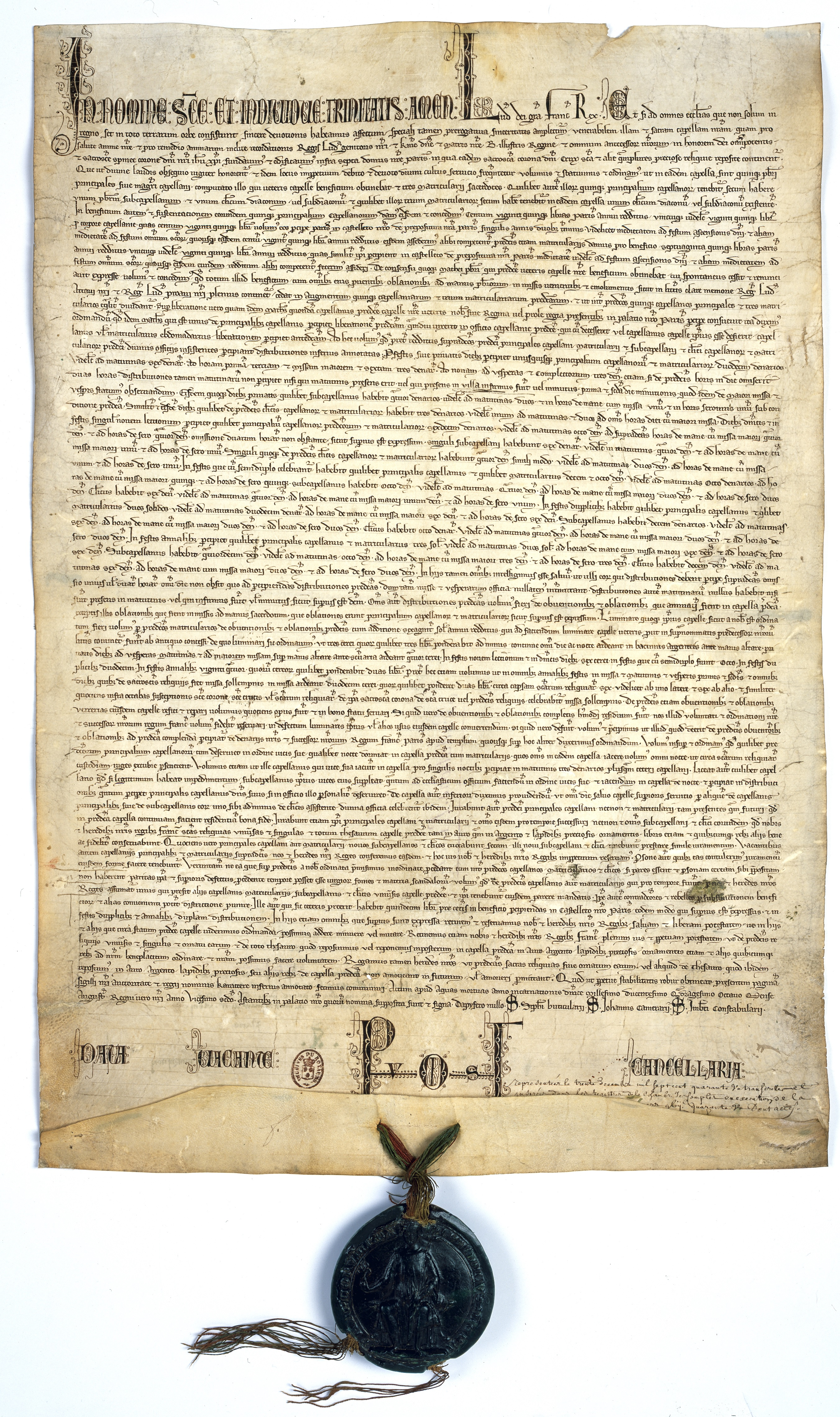 Diplôme de saint Louis pour la fondation de la Sainte Chapelle. Aigues Mortes, 22 août 1248